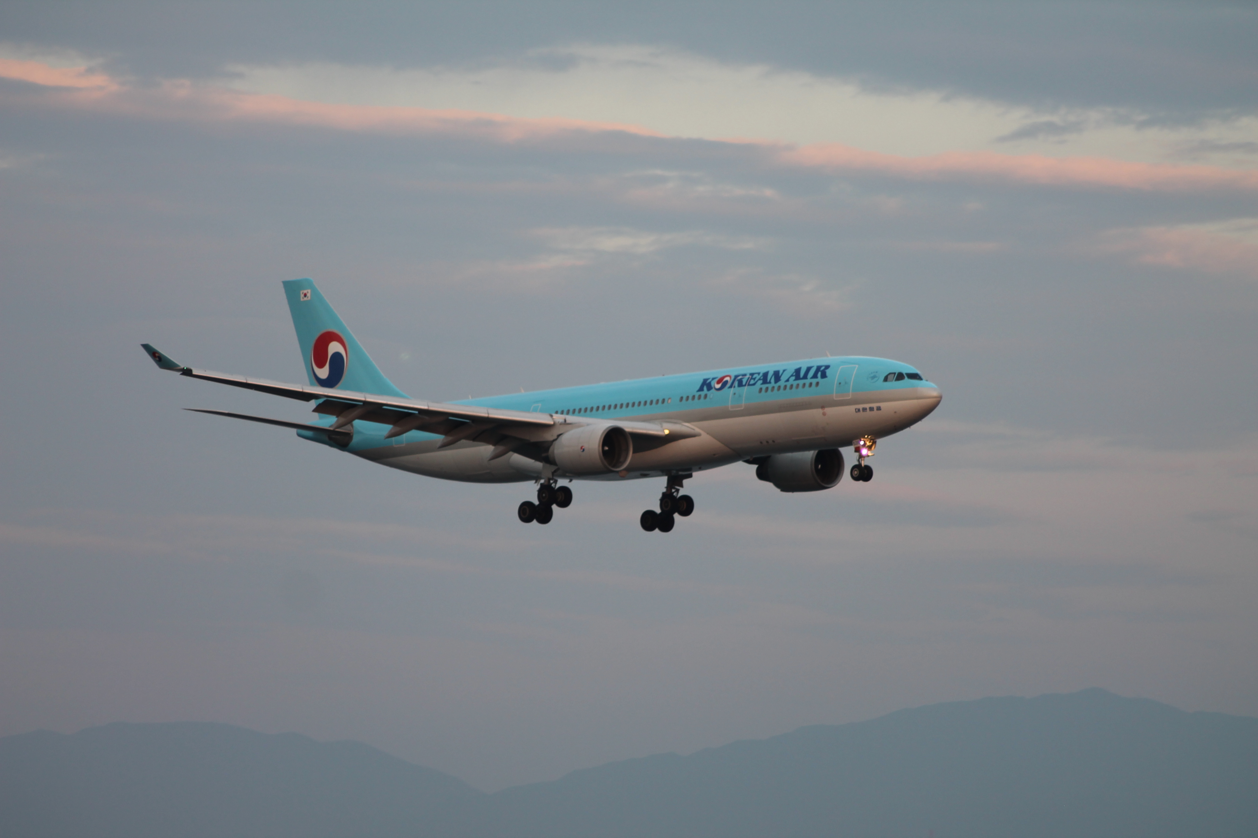 Osaka 2012